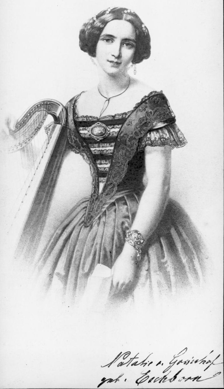 Natalie Eschborn (1829–1905), deutsche Theaterschauspielerin, Baronin von Grünhof